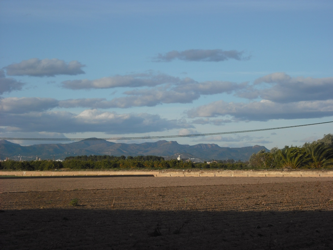 Huerta en las cercanías de Carpesa (Valencia).